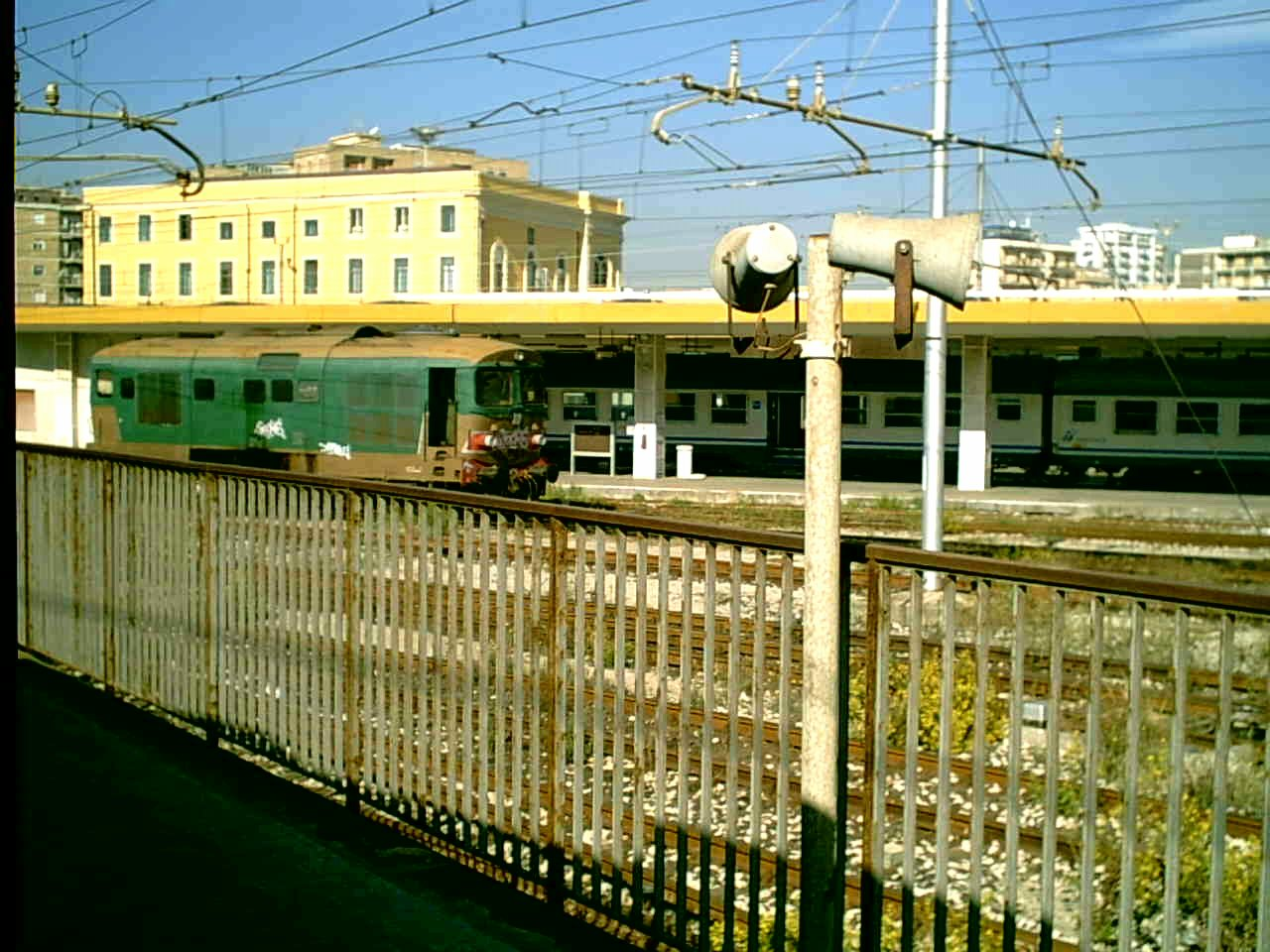 Foto della Stazione Centrale di catania dall'interno